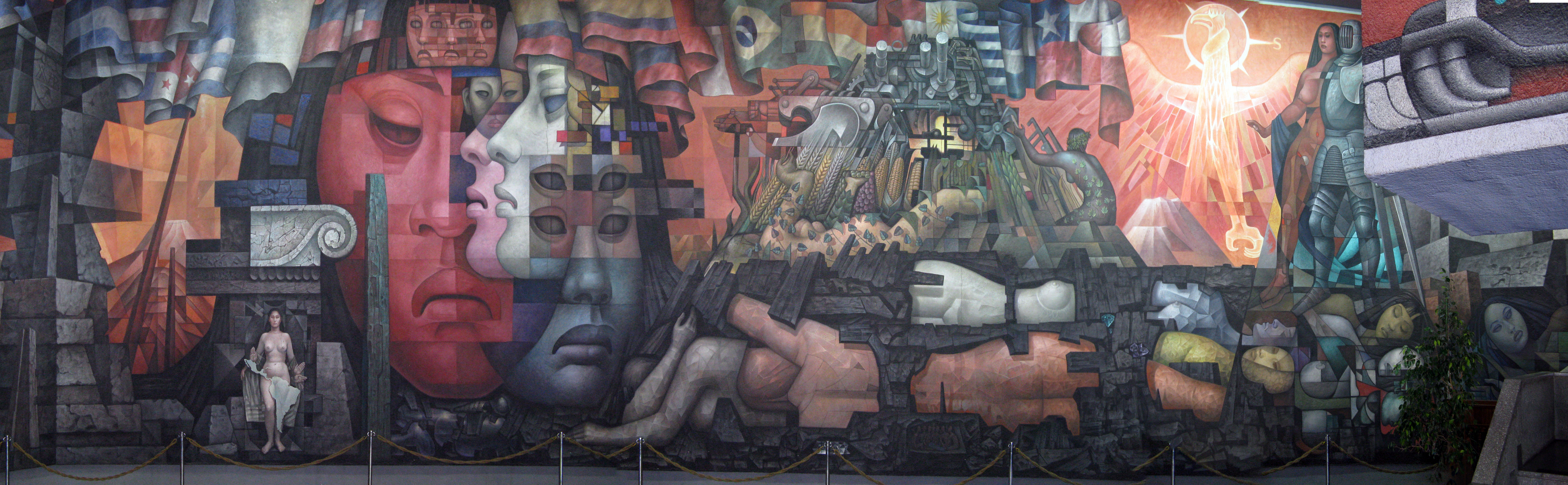 Panorámica del mural "Presencia de América Latina", ubicado en la Casa del Arte, Universidad de Concepción, Chile; obra hecha en 300 metros cuadrados. This is a photo of a national monument in Chile: 2120